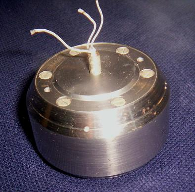 Kreiselmotor, Außenläufer, ca. 20.000 U/min, mit Anschlussdrähten (400Hz/27V Drehstrom) Hersteller aus der Sowjetunion, ca. 1969